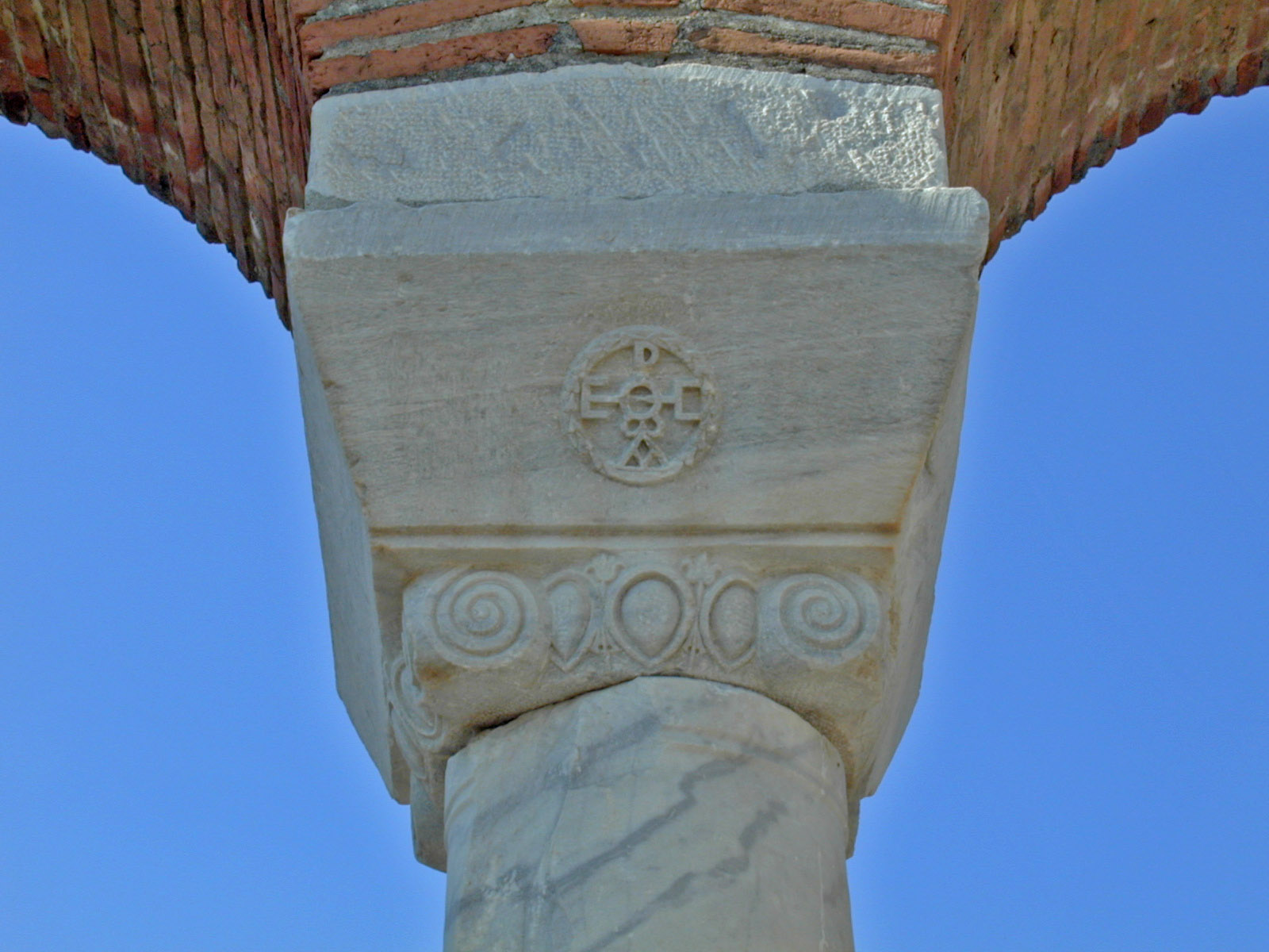 Chapitau ionique à imposte portant le monogramme de l'impératrice Théodora, église Saint-Jean d'Éphèse, vers 535-541.